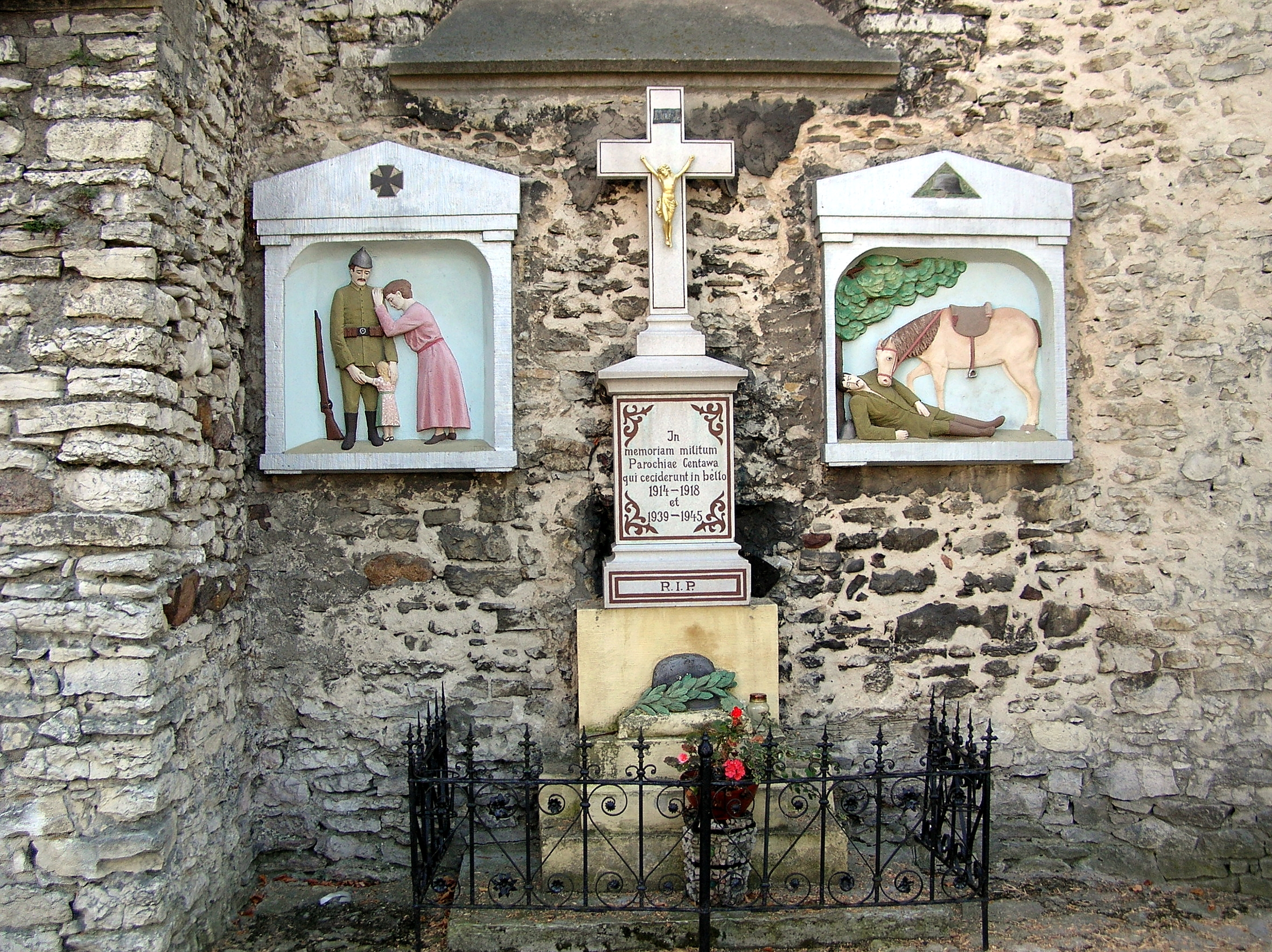 Centawa - kościół parafialny p.w. NMP, XV/XVI, XIX, pomnik parafian poległych w wojnach światowych